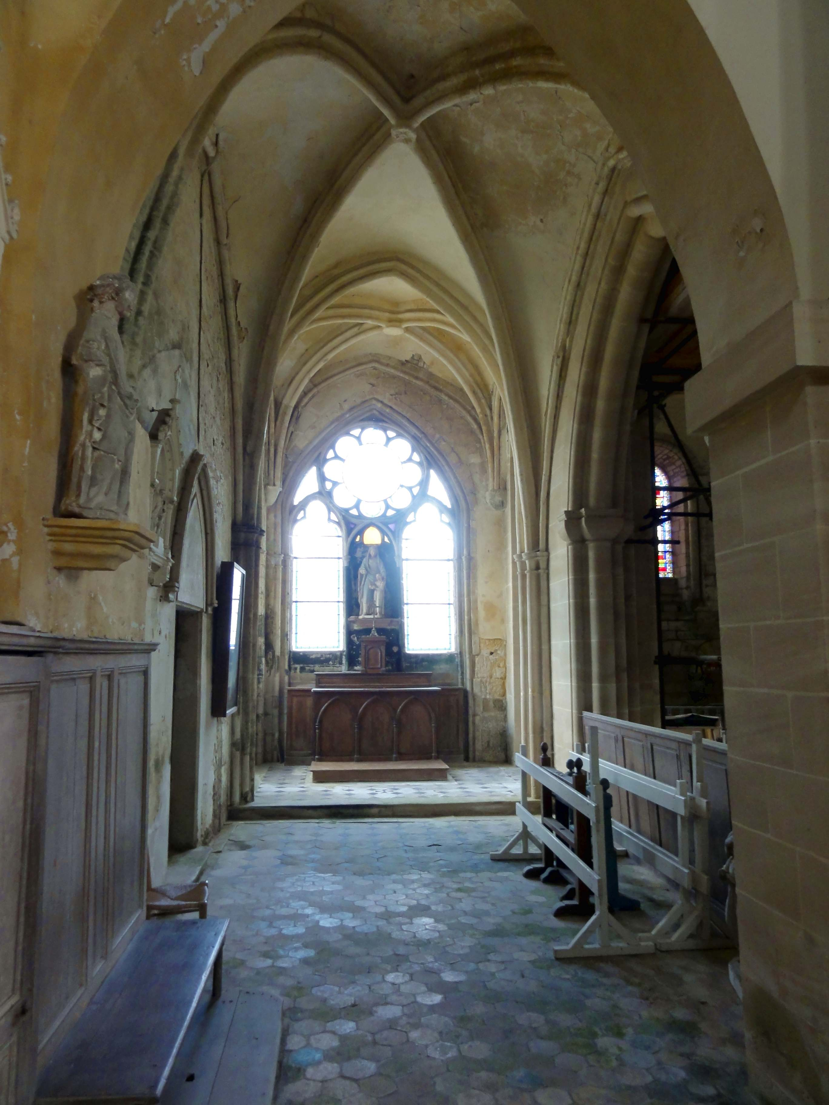 Intérieur de l'église - voir le titre du fichier.